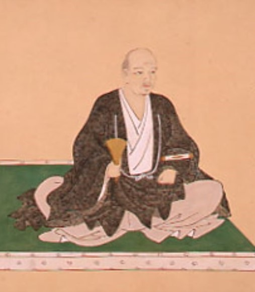 池田恒利の肖像。